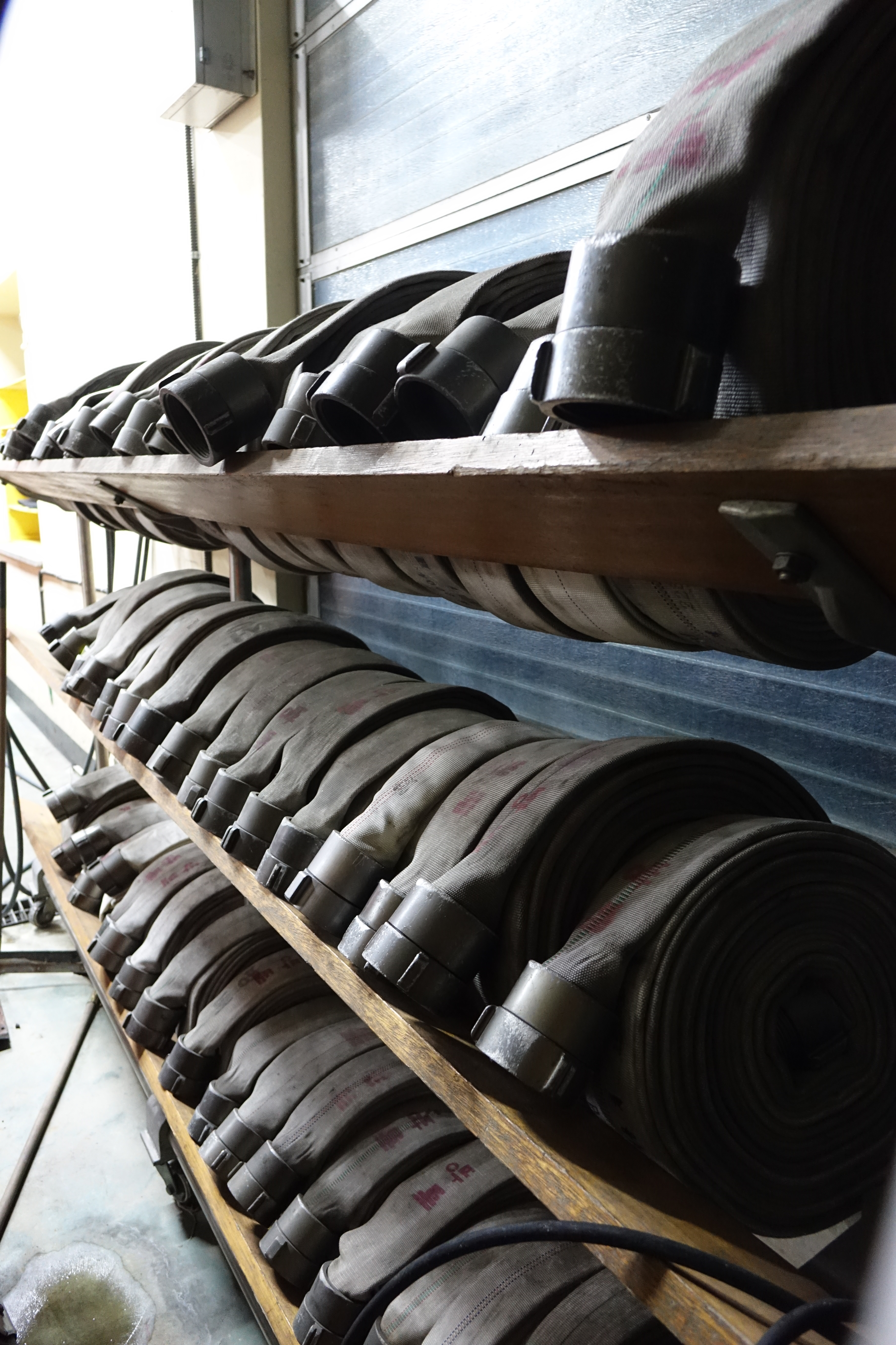 소방호스, 방배119안전센터